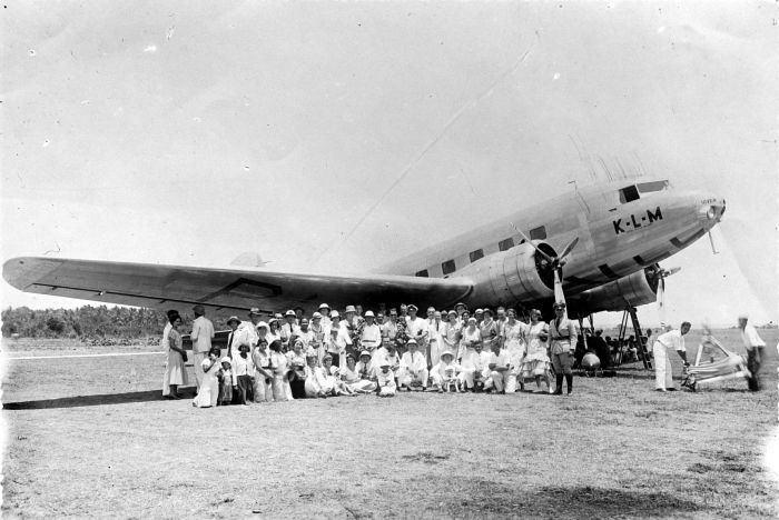 Repronegatief. Een groep Europeanen staat op het vliegveld Rambang voor het vliegtuig de Uiver, dat is aangekomen op Lombok na afloop van de London-Melbourne-race in 1934